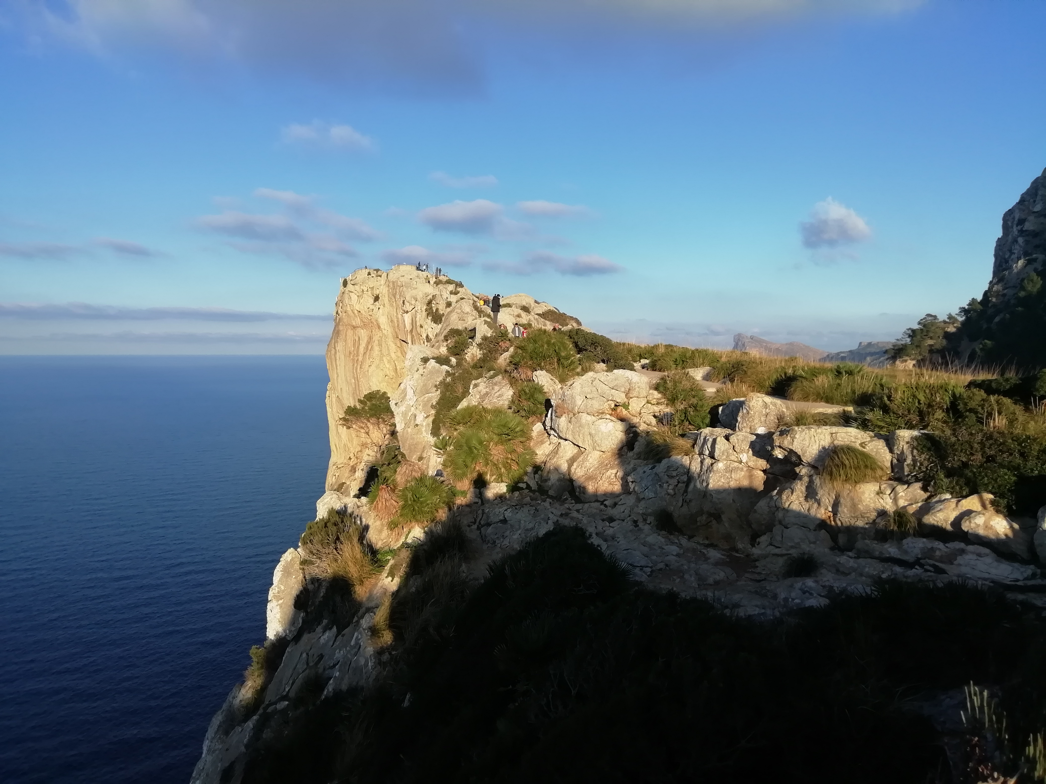 Pollensa, Mallorca.